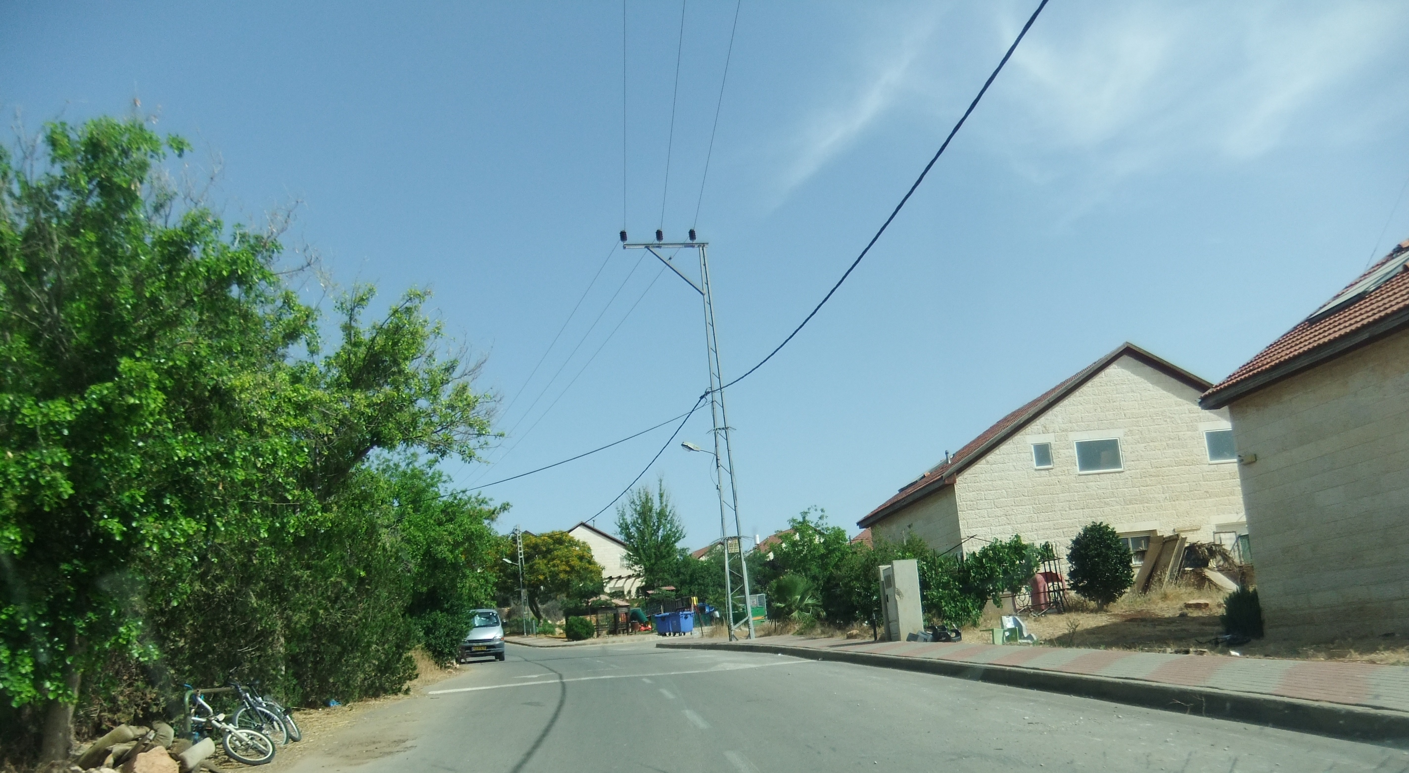 Kokhav HaShahar